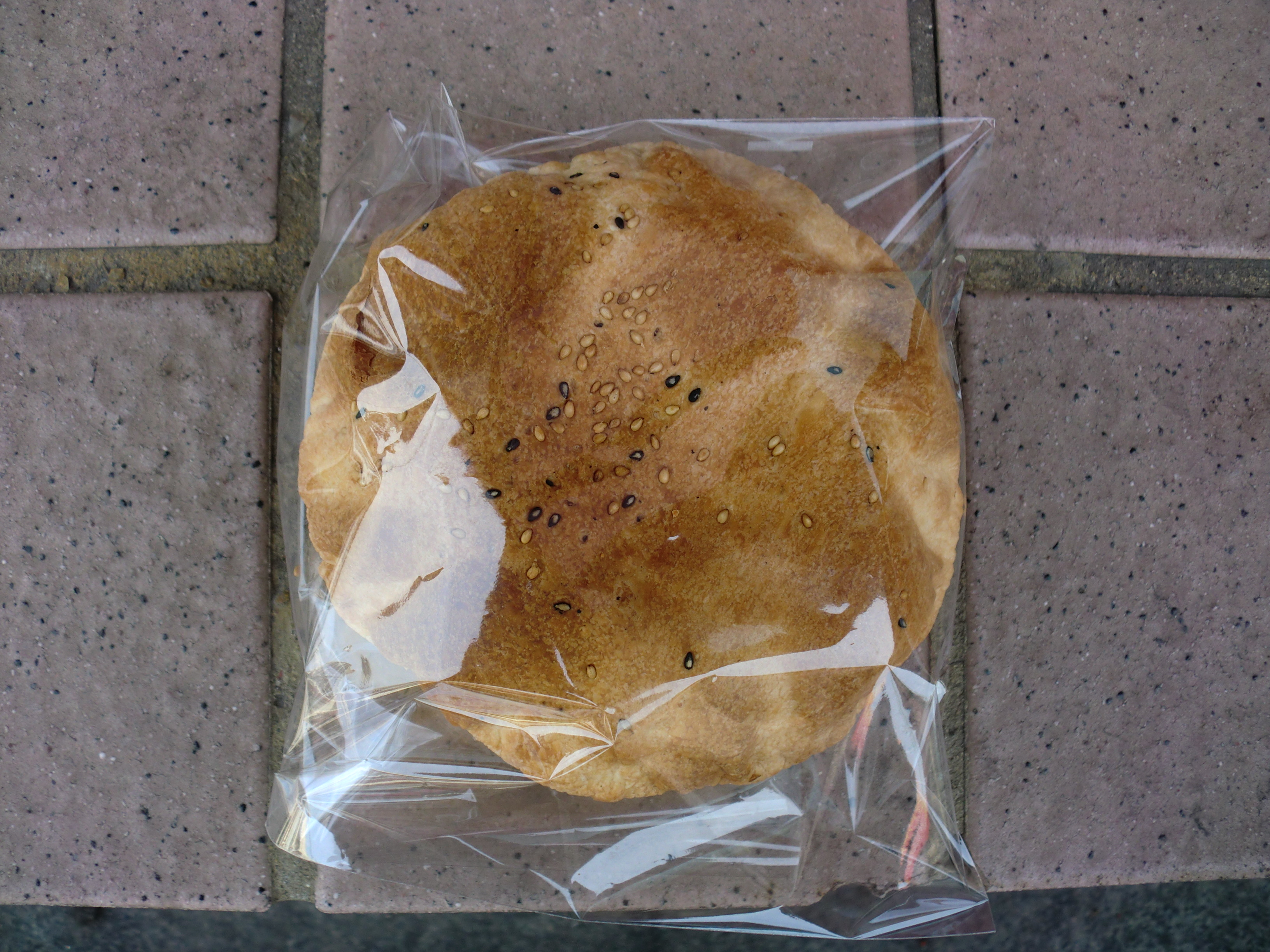 인천차이나타운에 판매되어 있는 공갈빵